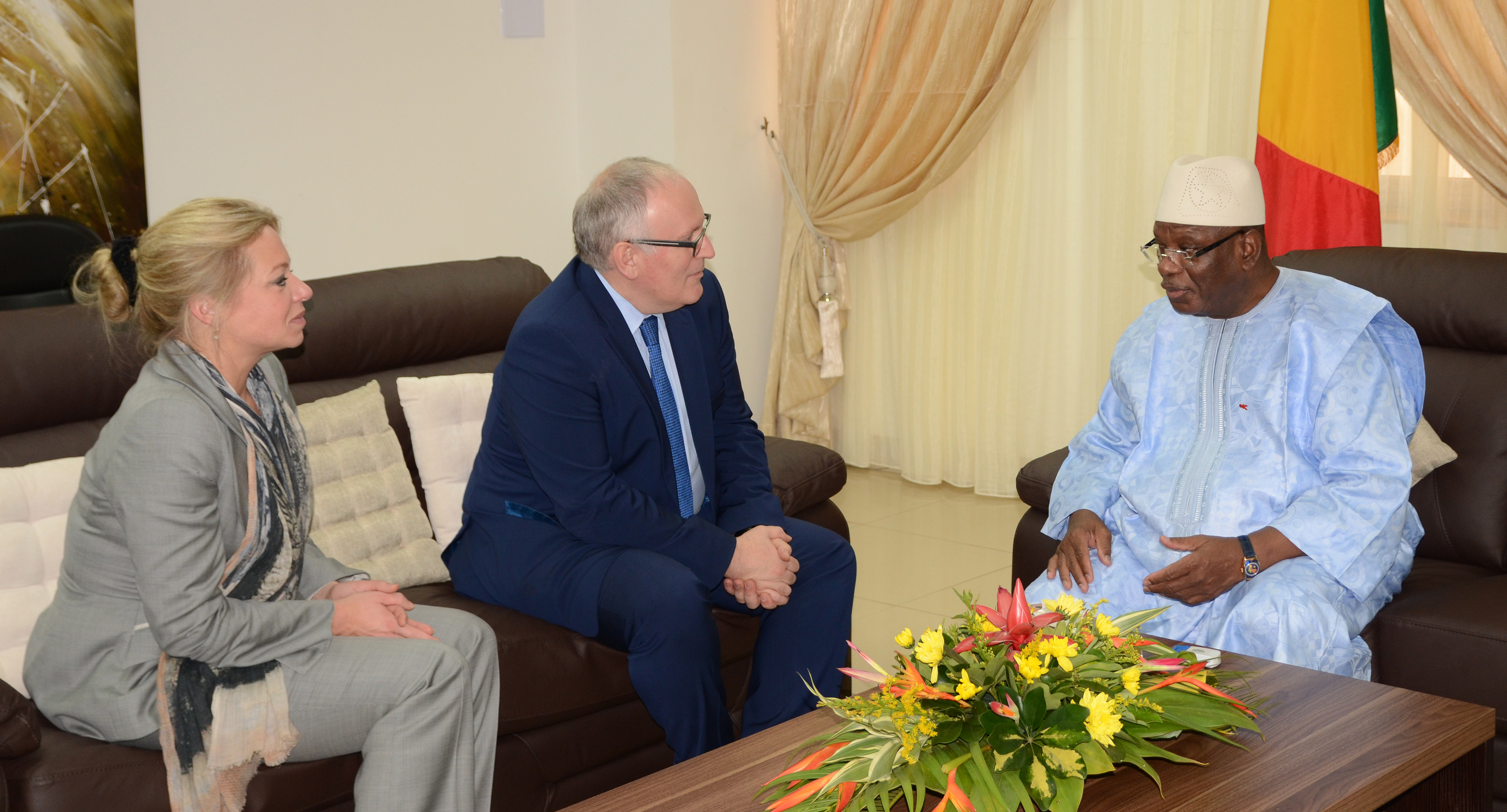 131128 Timmermans en Hennis bij Ibrahim Boubacar Keïta president Mali 4685